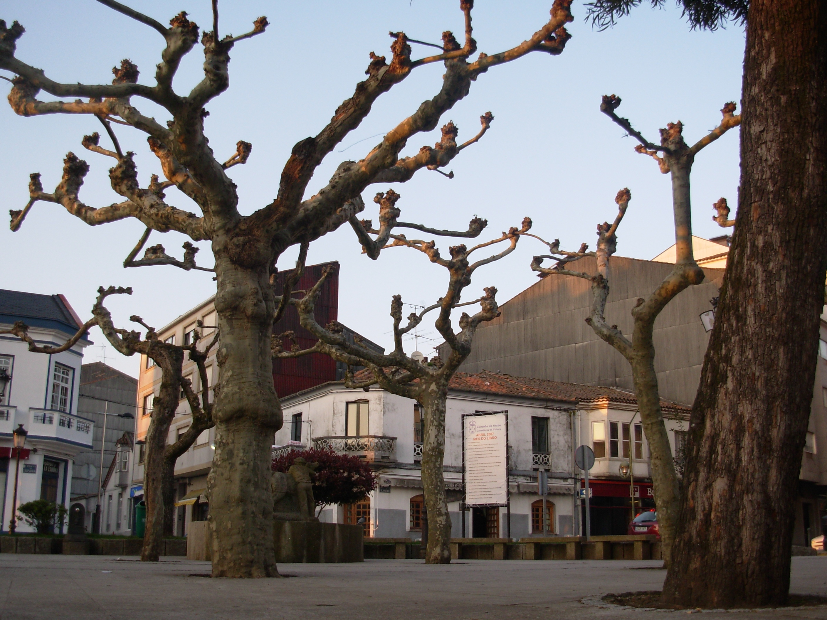 Arzúa